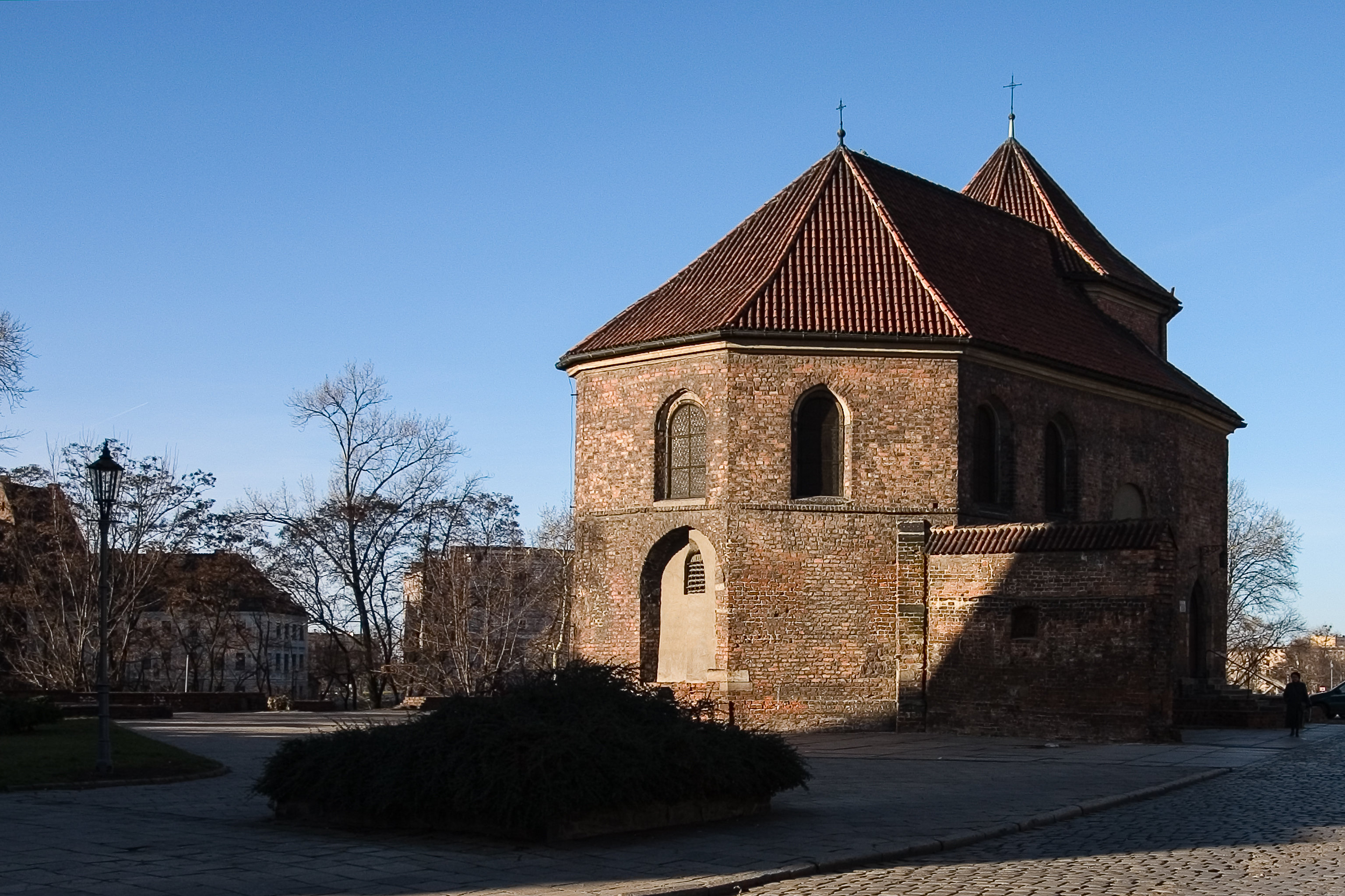 Kościół p.w. św. Marcina